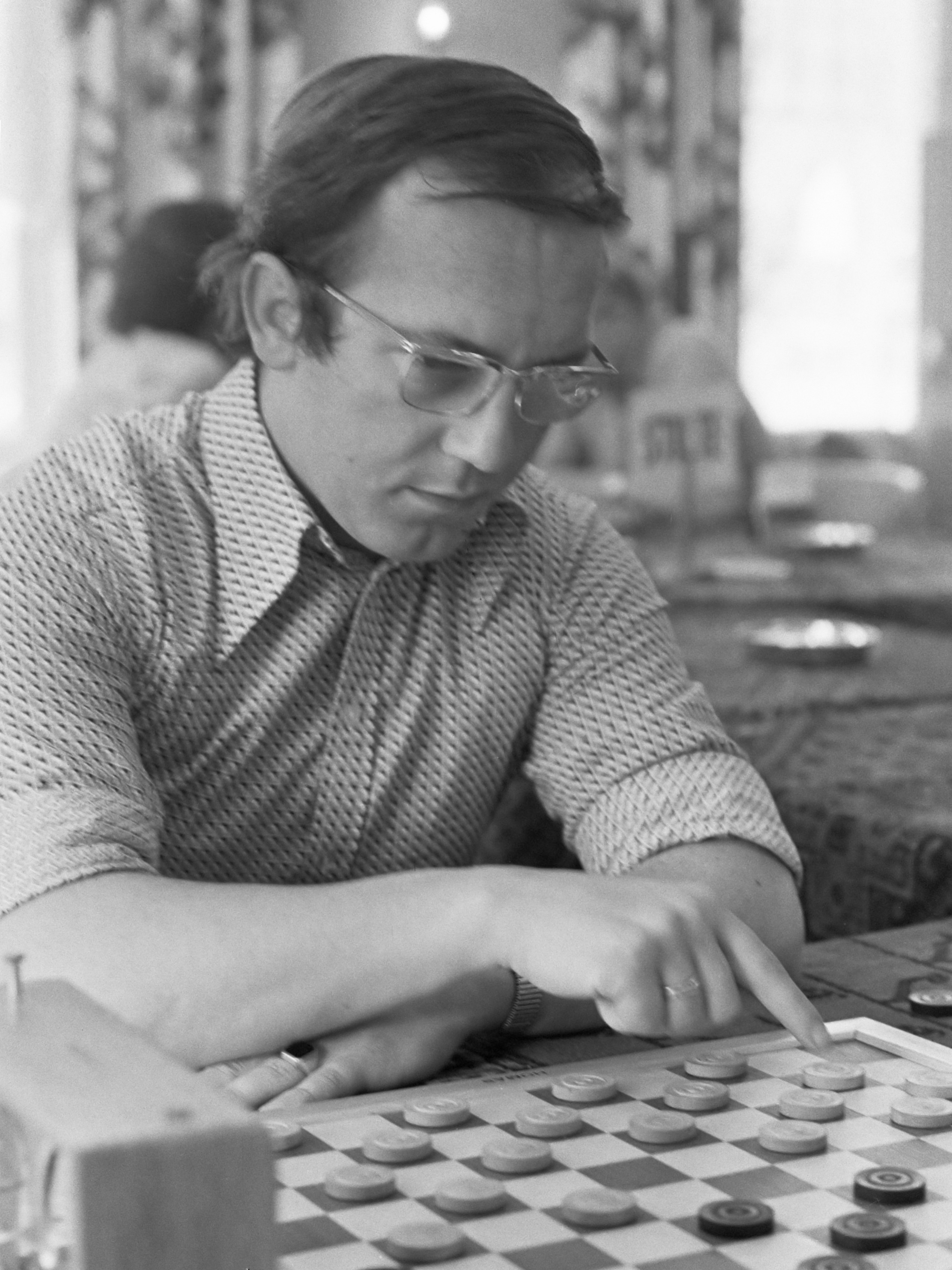 Damkampioenschap 1974 in Apeldoorn, Cees Varkevisser 11 april 1974